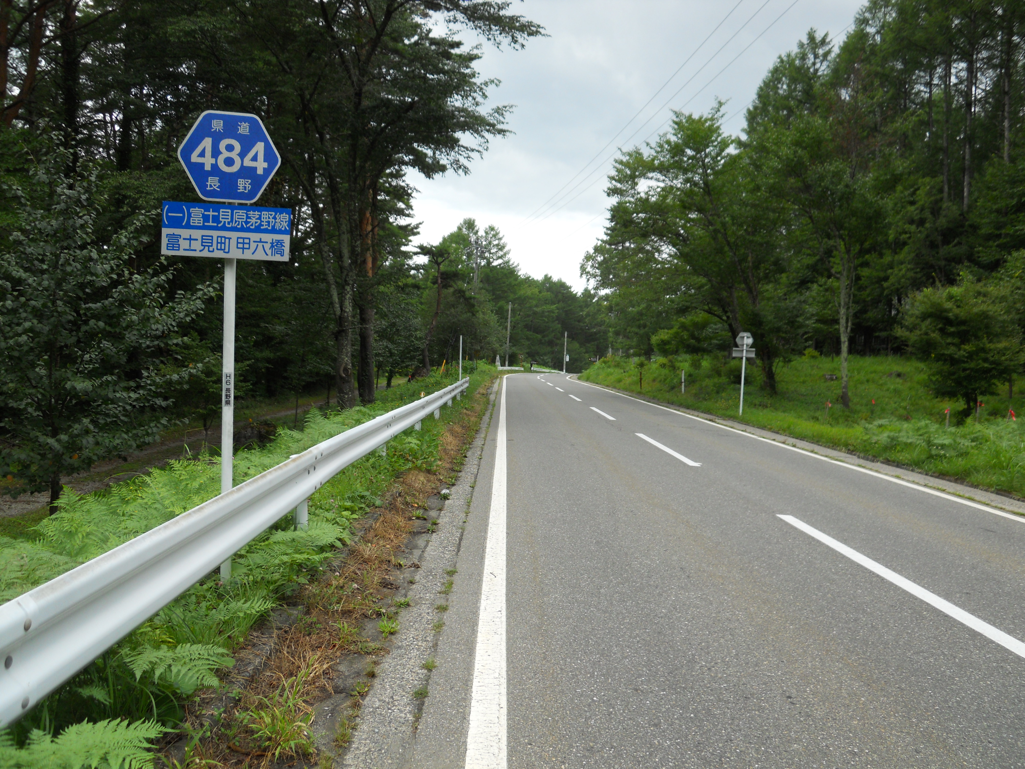 県道484号富士見原茅野線起点